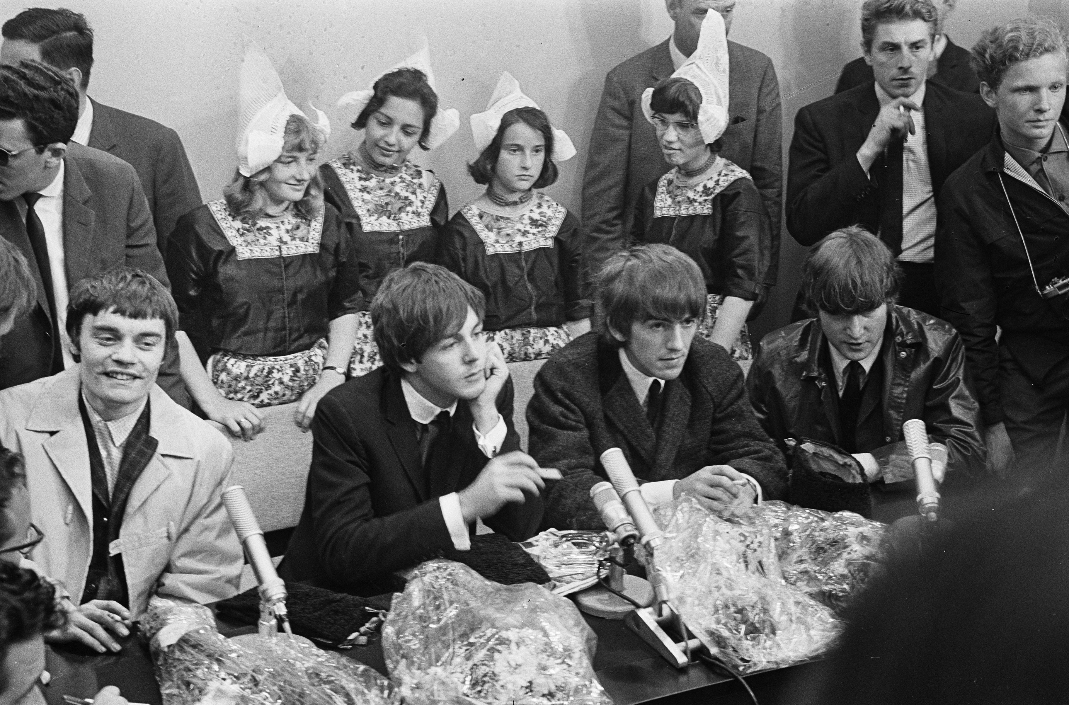 The Beatles tijdens een persconferentie op Schiphol, vlak na hun aankomst in Nederland.